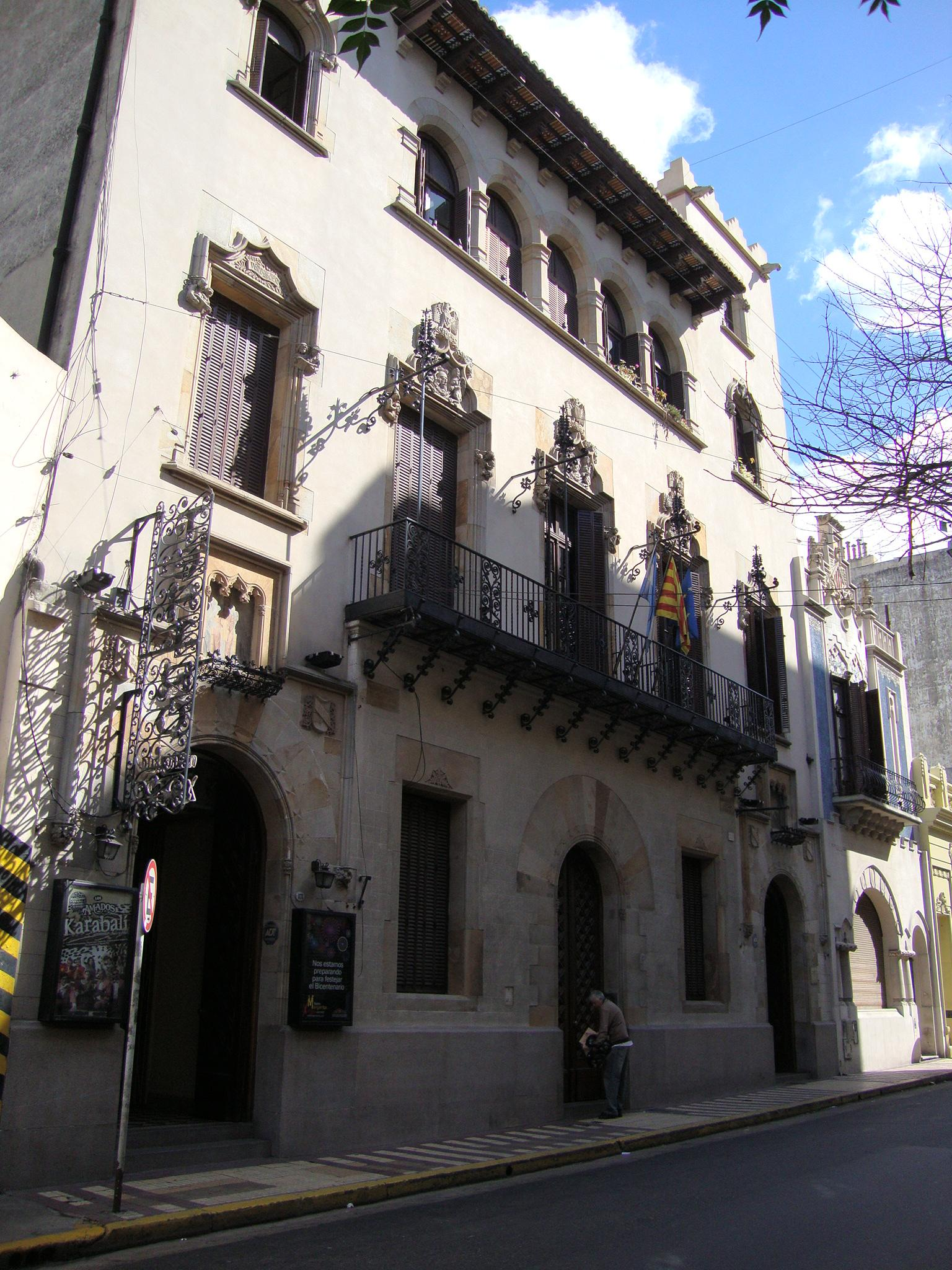 Casal de Catalunya y Teatro Margarita Xirgu, realizado por los arquitectos Julián García Núñez y Eugeni Campllonch en estilo modernista catalán. Calle Chacabuco 863. Buenos Aires, Argentina.